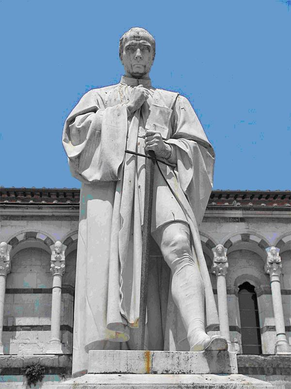 Statue of Francesco Burlamacchi in Piazza San Michele in Lucca, Italy.